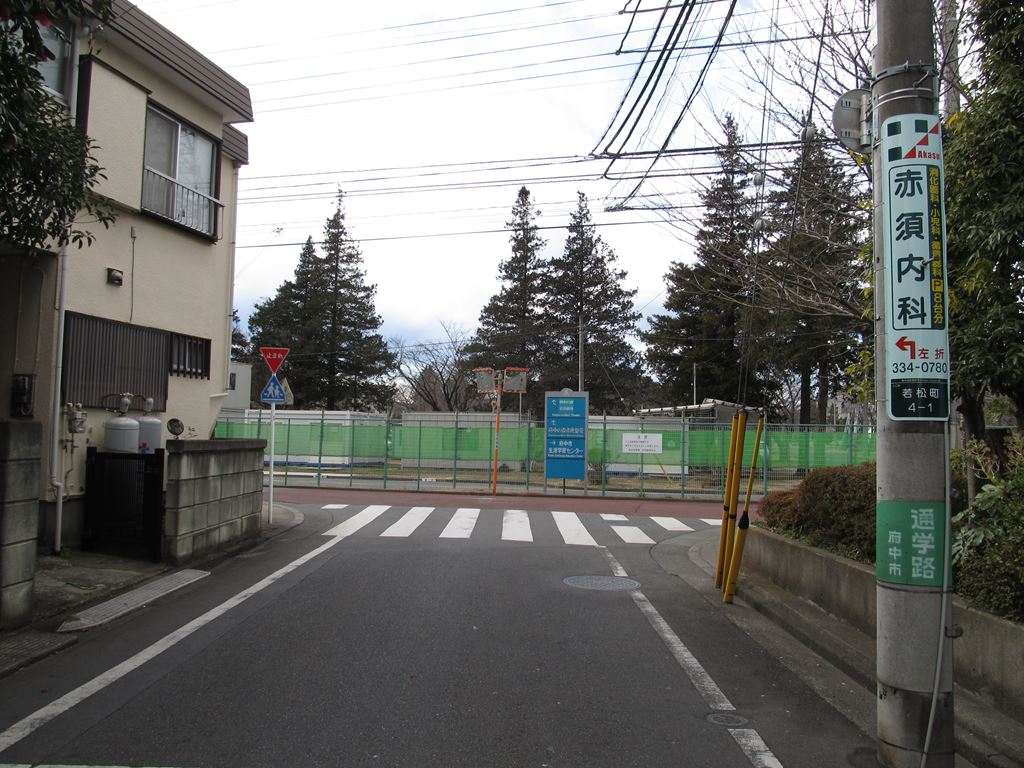 人見街道終点。東京都府中市若松町４丁目